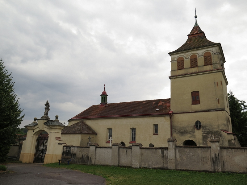 Kostel Zvěstování Panny Marie, Knířov.